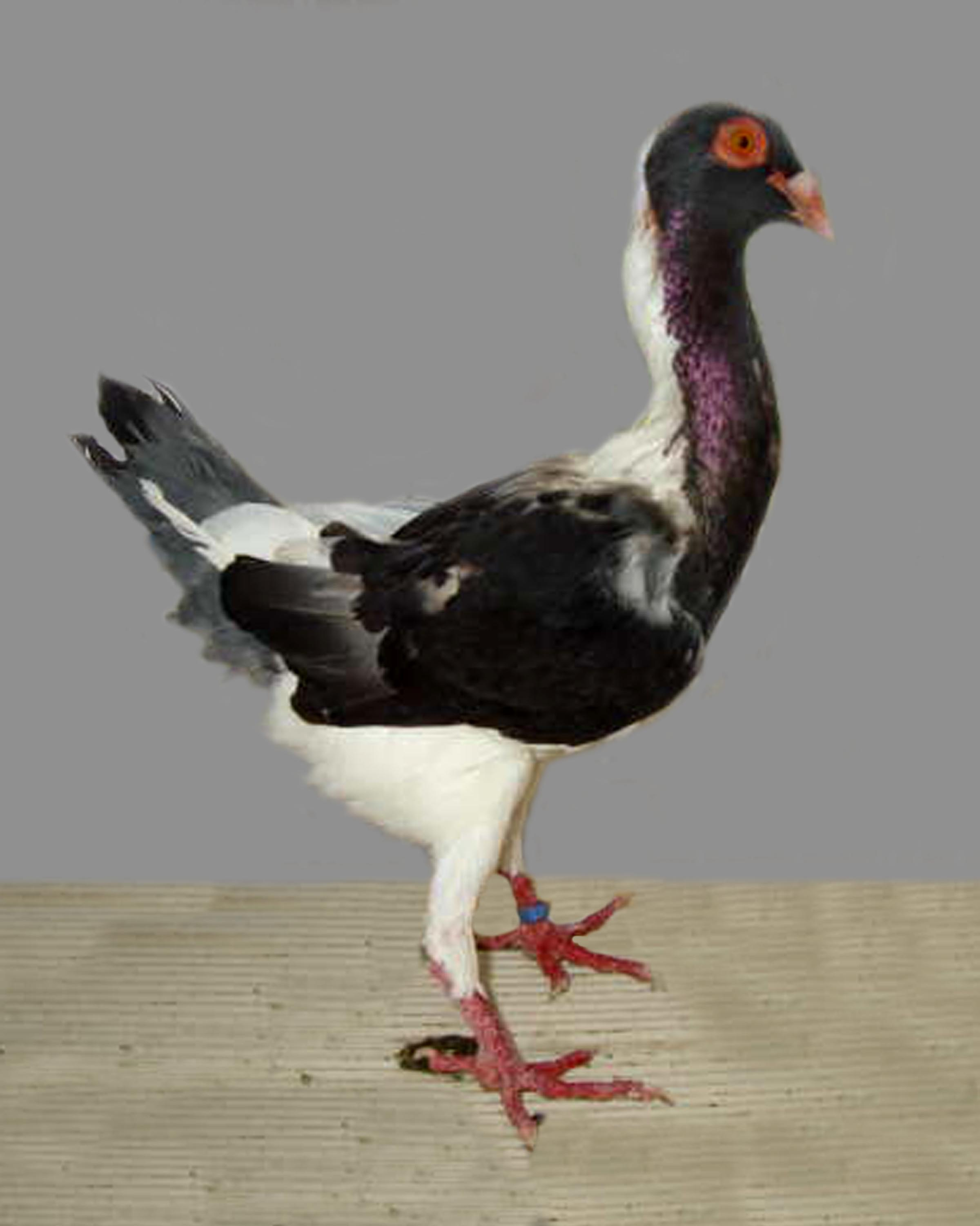 Hungarian (Black)